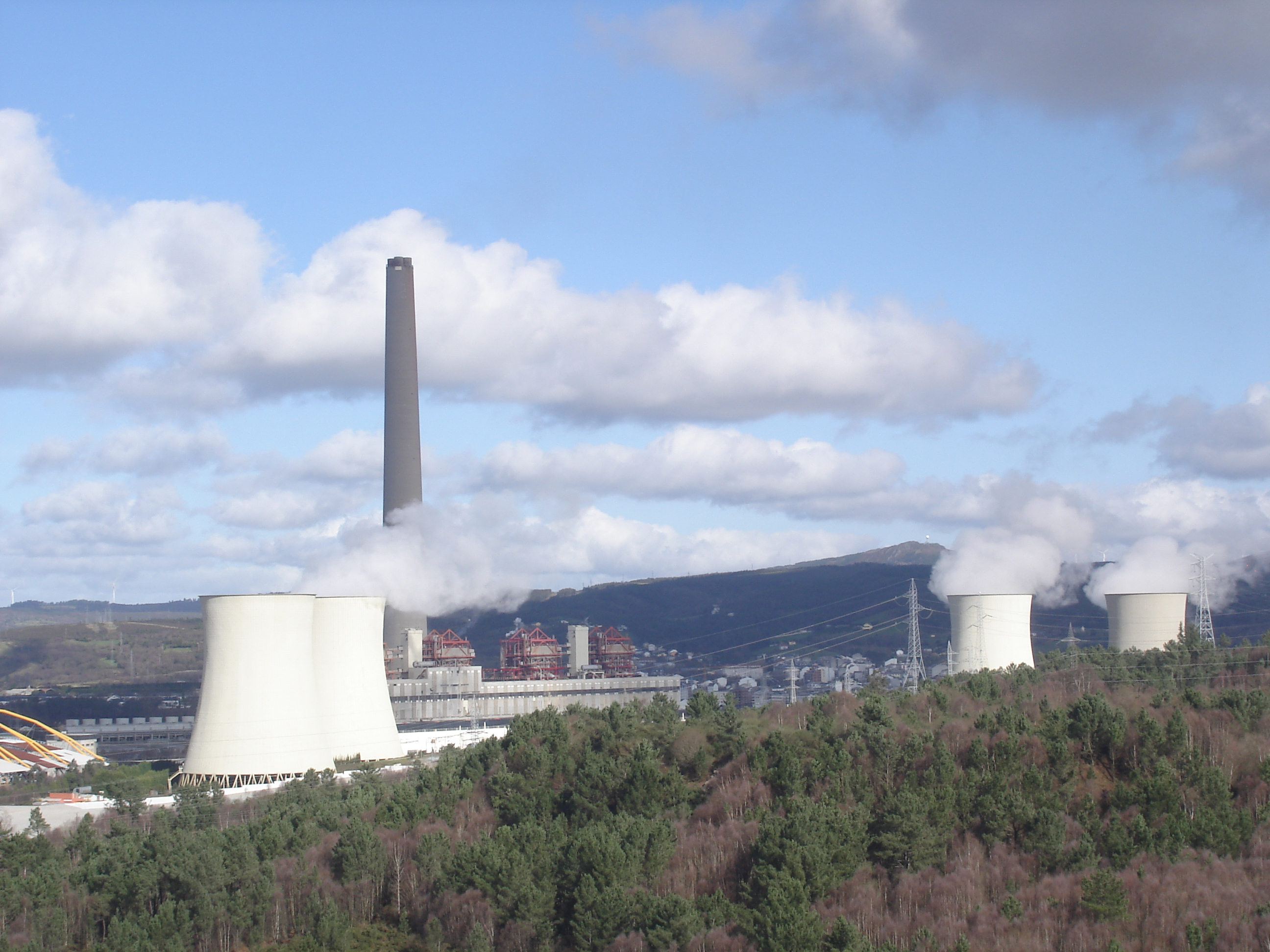 Central térmica do concello das Pontes de García Rodríguez.